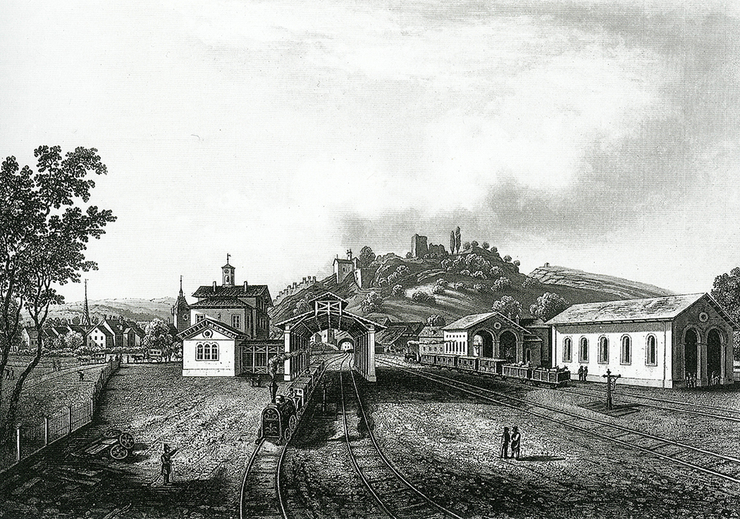 Bahnhof Baden Switzerland